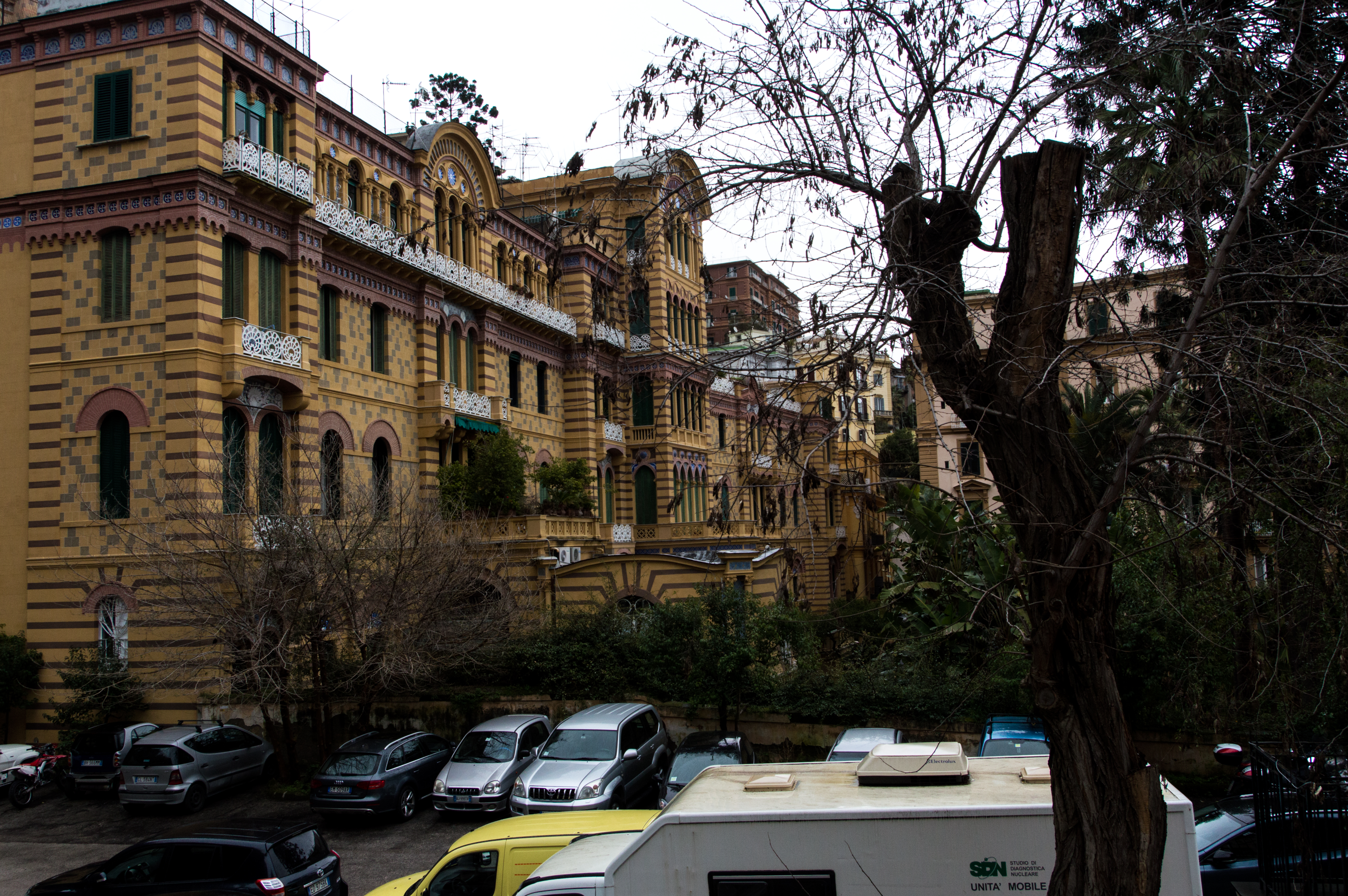 Scorcio del Grand Hotel Eden in Piazza Amedeo